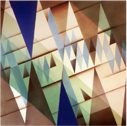 Opera pittorica del Maestro Romano Rizzato dal titolo "Scorrimenti Incrociati", tecnica acrilico aerografo e collage, dimensioni cm. 60x60, anno di realizzazione 1993-94.